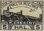 Chęciny 1919 rok